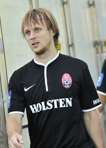 Дмитрий Хомченовский